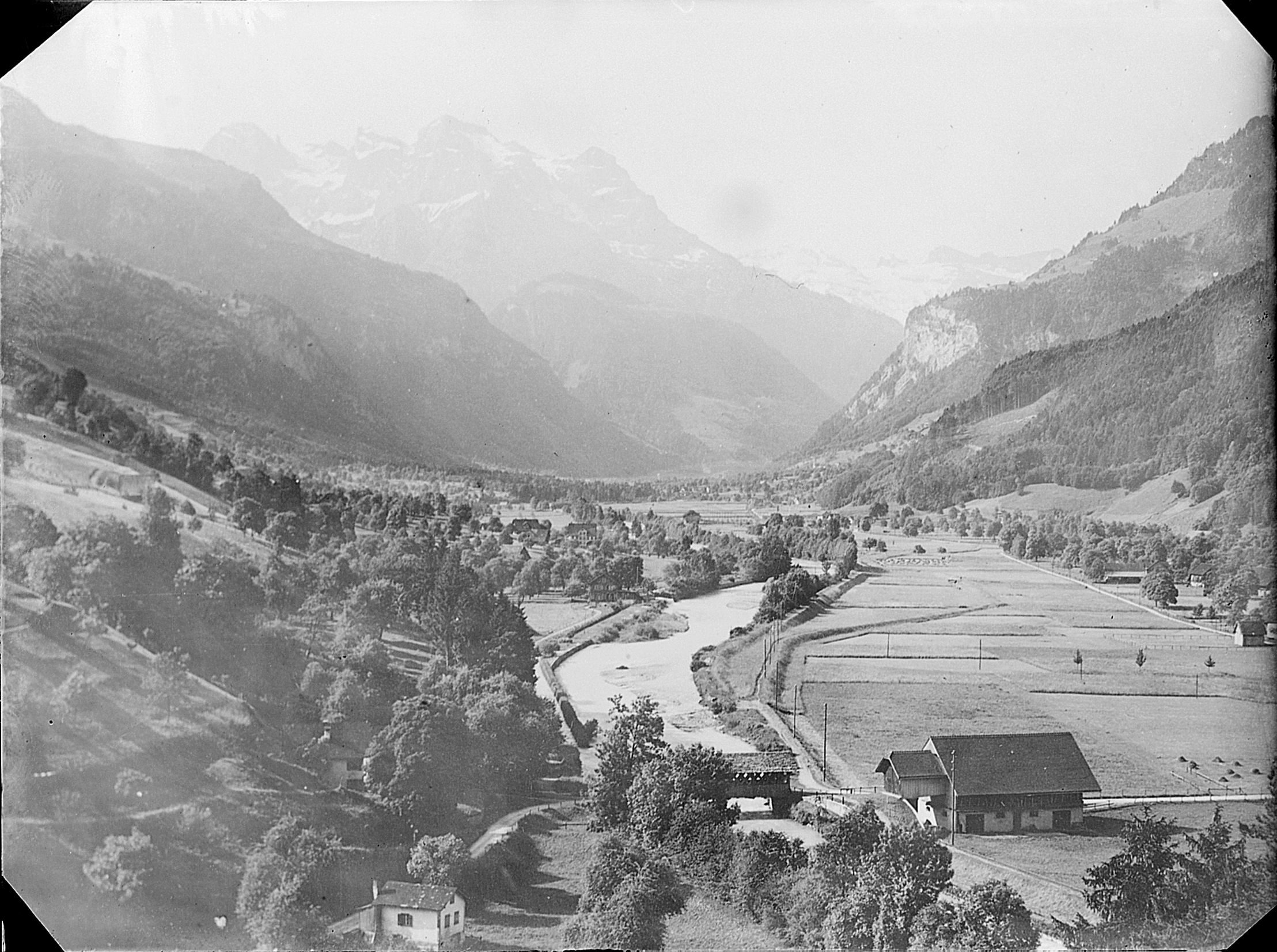 Engelbergertal mit Engelbergeraa. Blick von Oberdorf Richtung Dallenwil. Fotosammlung Franz Kaiser, Staatsarchiv Nidwalden OD 100-1:49.